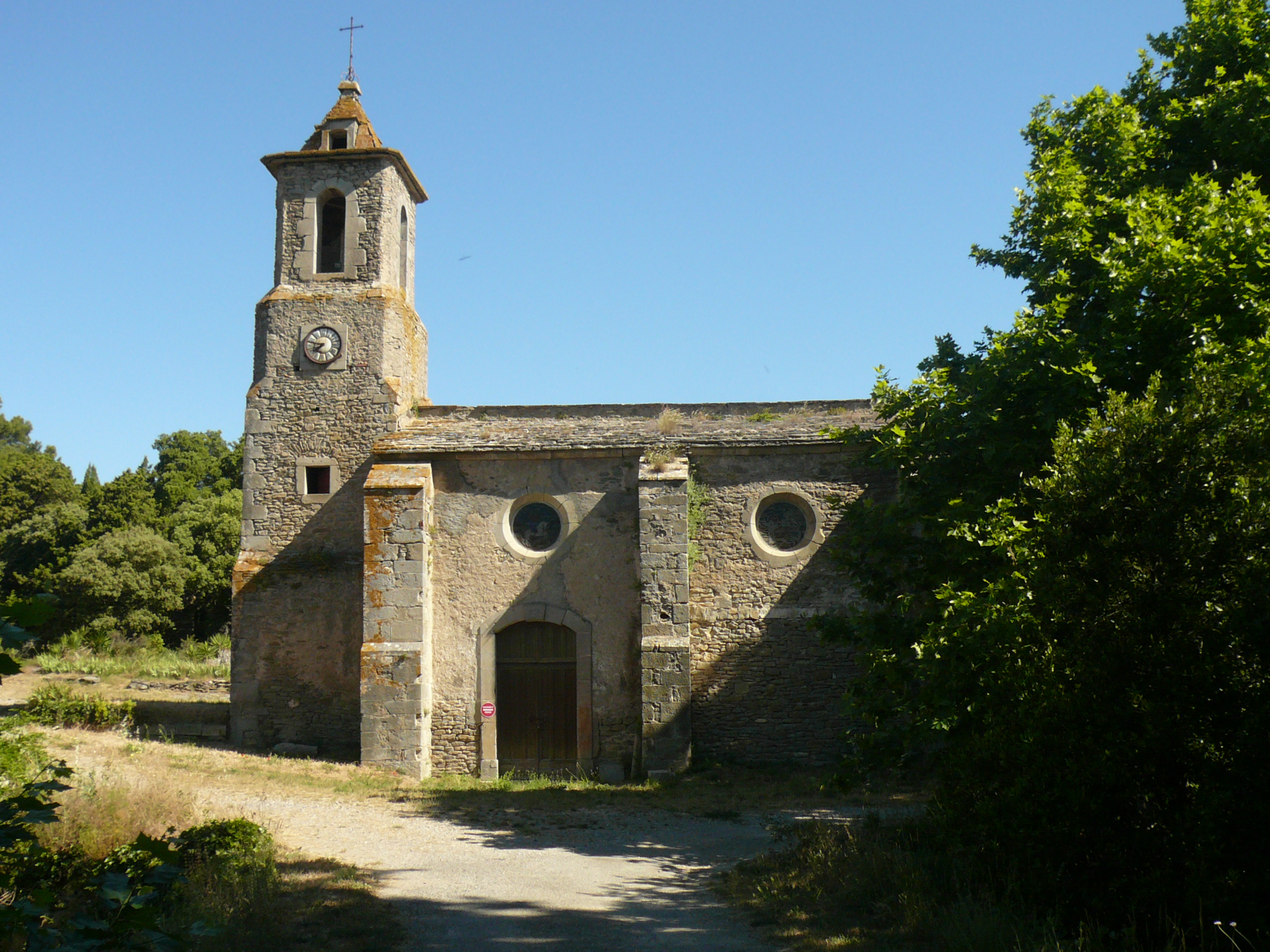 Eglise Saint-Pierre-es-Liens à Villarlong (et non Notre-Dame-de-la-Lauze) à Villarzel-Cabardès (Aude)